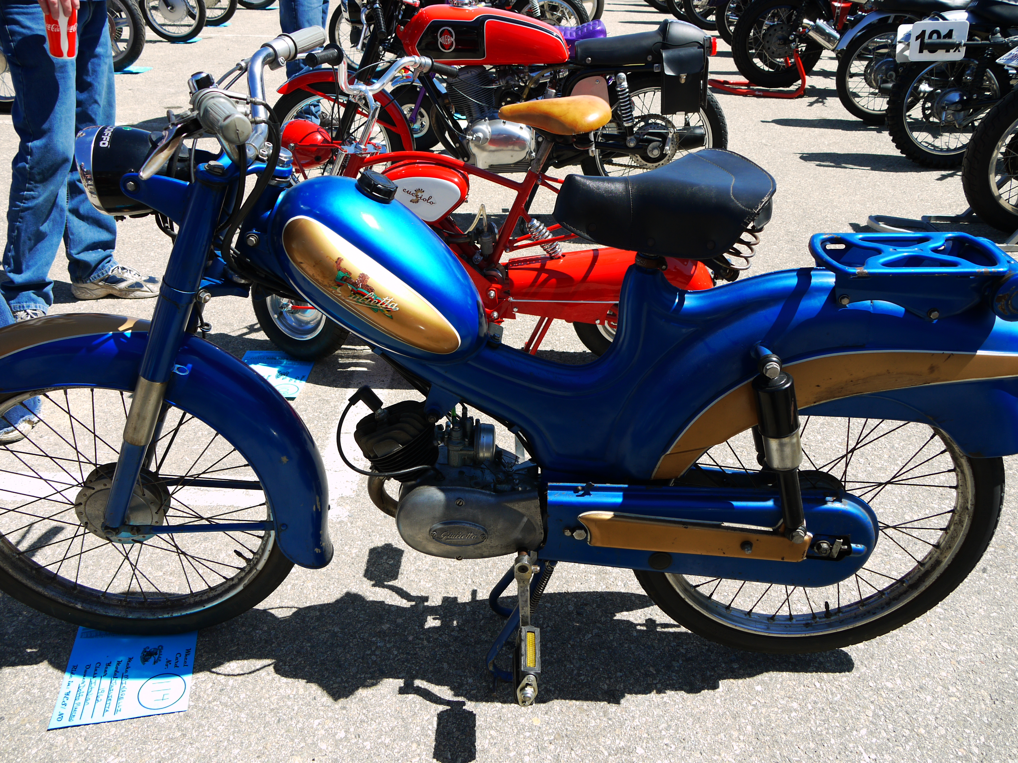 Giulietta Peripoli 50 GT Export Lusso del 1964